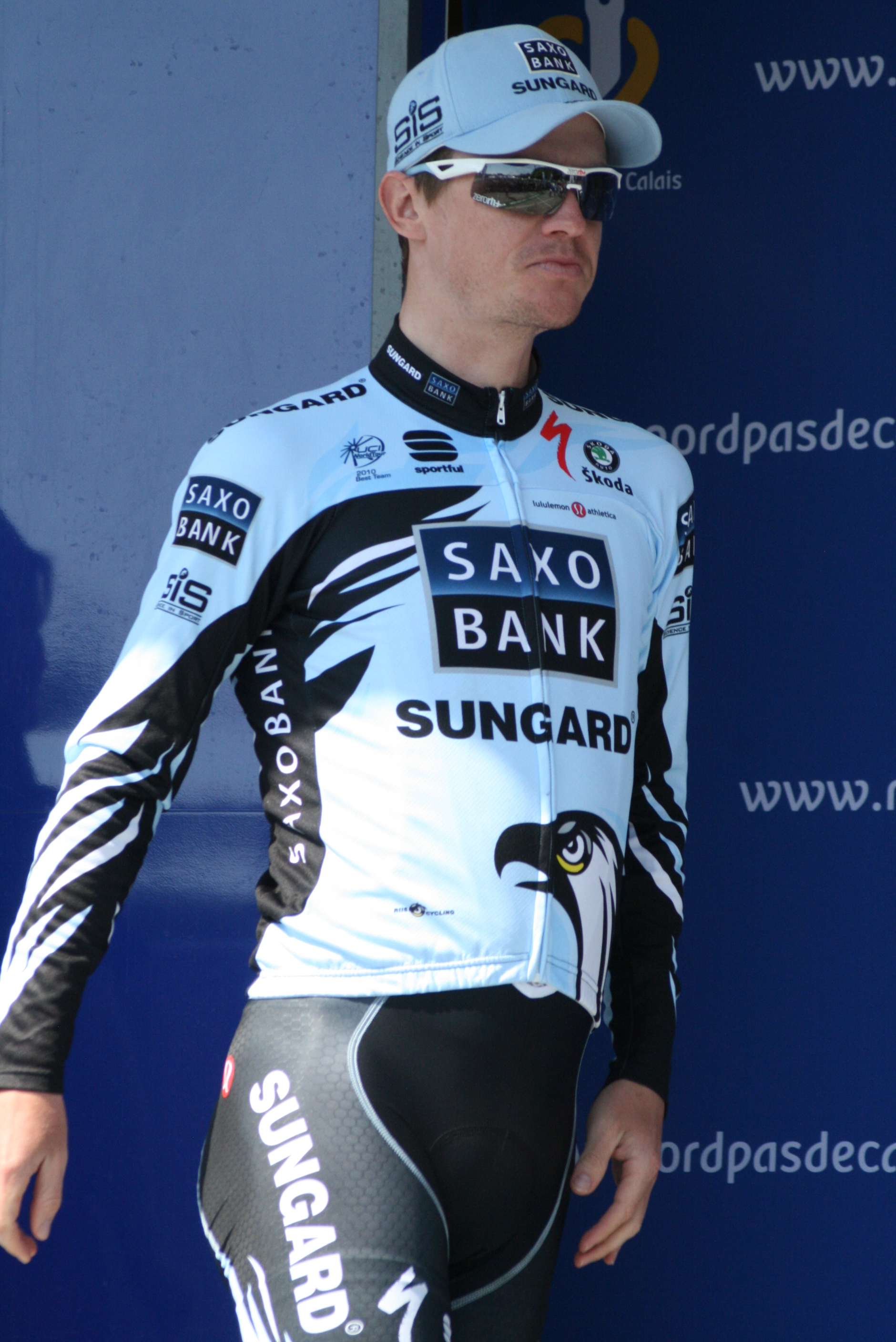 Présentation des coureurs au départ de la première étape Nick Nuyens